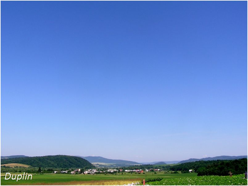 Celkový pohľad